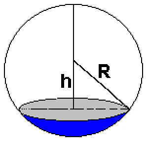 Illustration pour l'intégrale du calcul du volume d'une spère